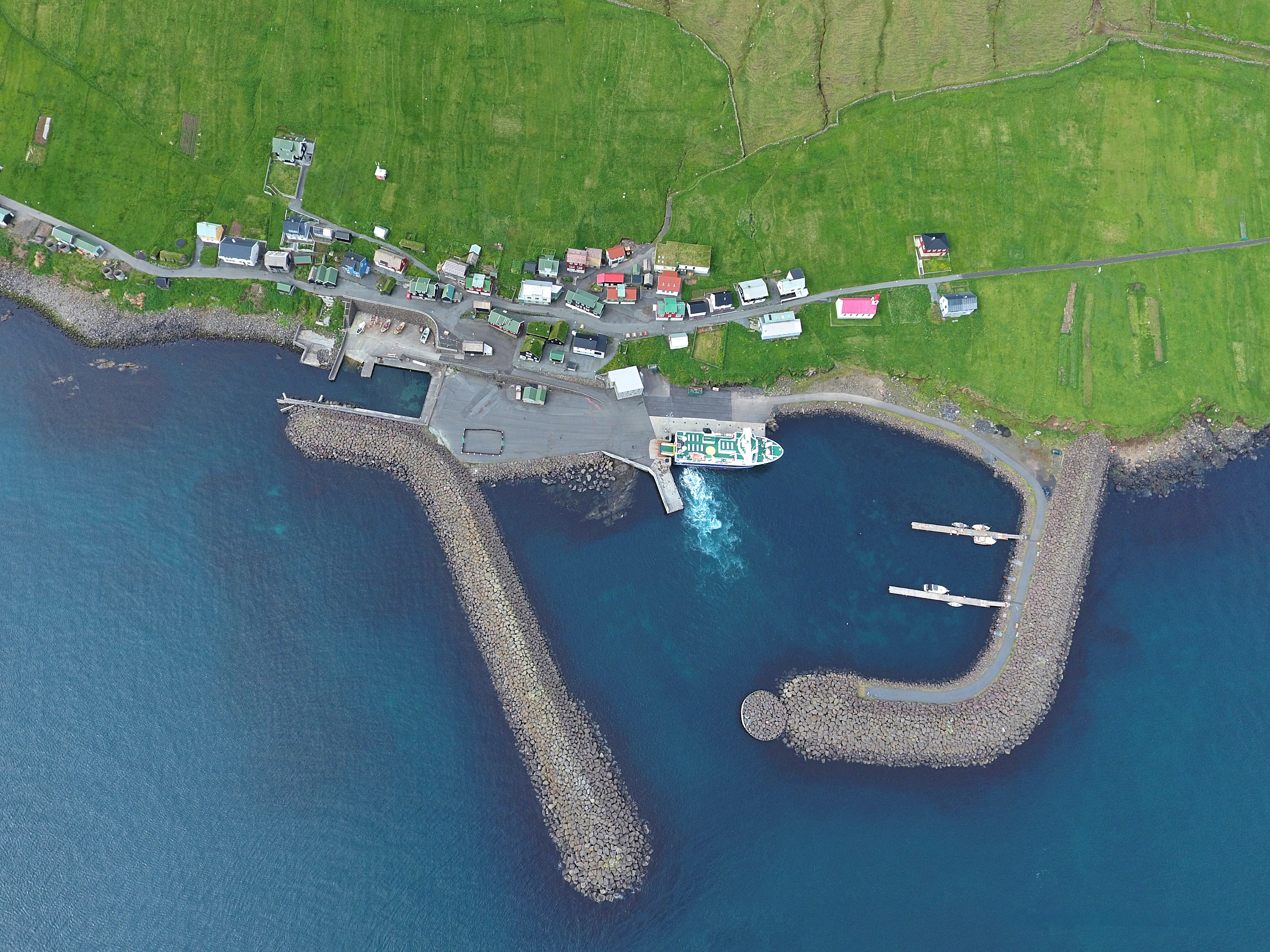 Hestur luftfoto.